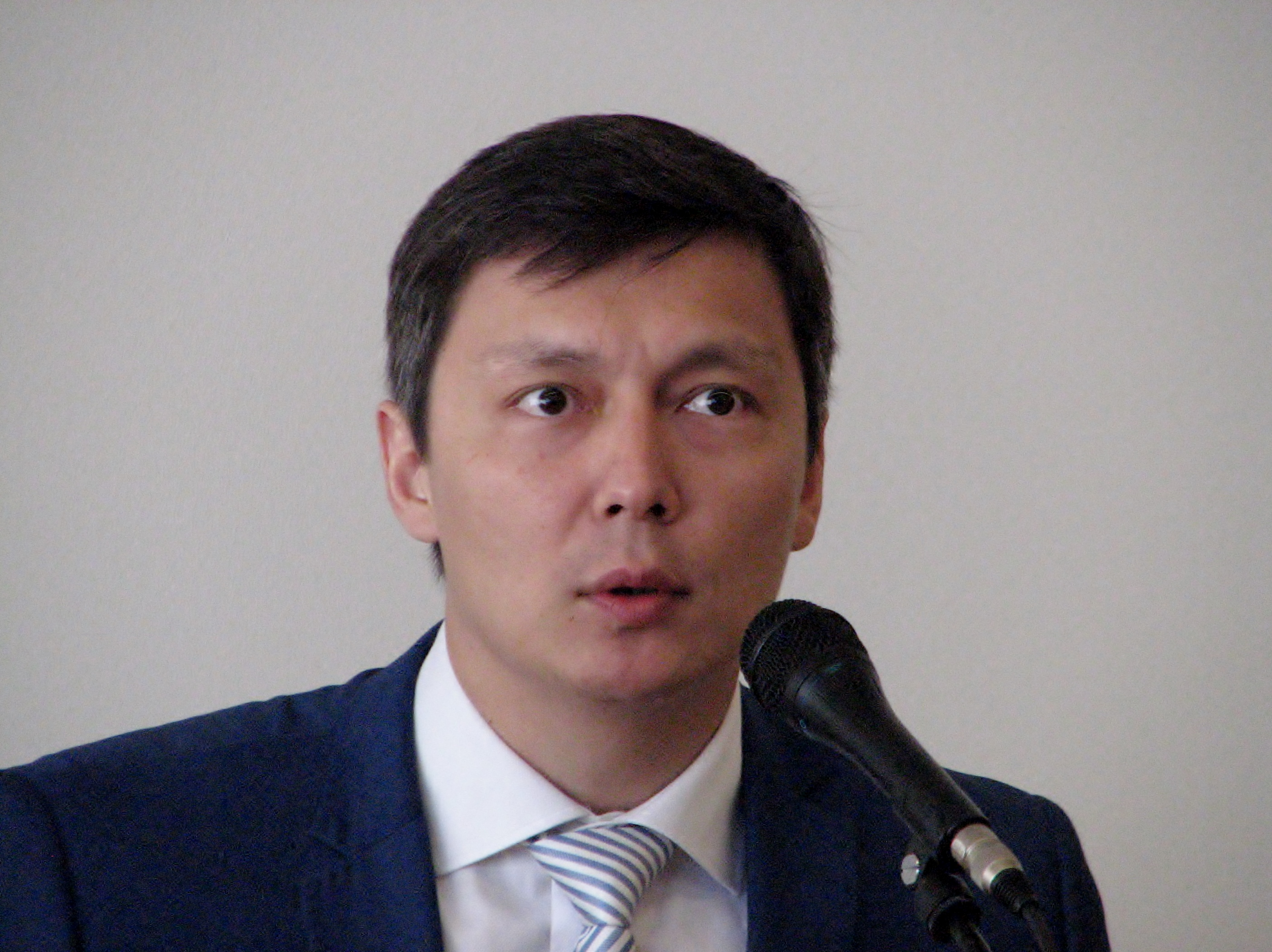 Mihhail Kõlvart Tallinna päeval